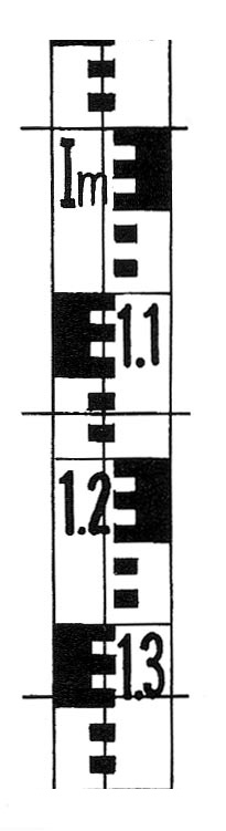 djat,private